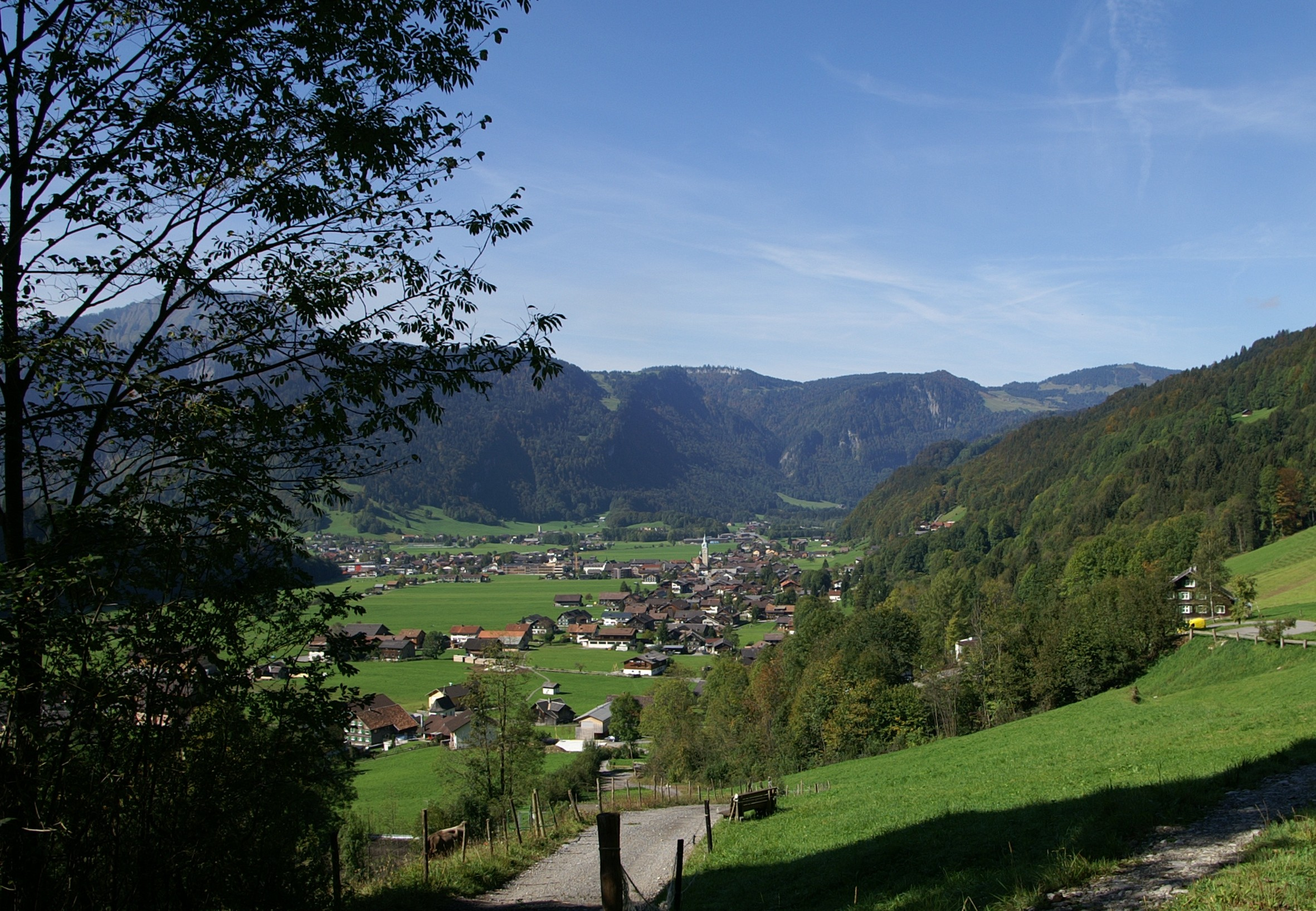 Gemeinde Bezau Blick von der Halde.